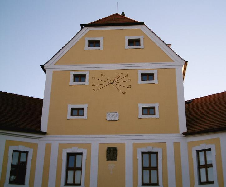 Zameček od dvora